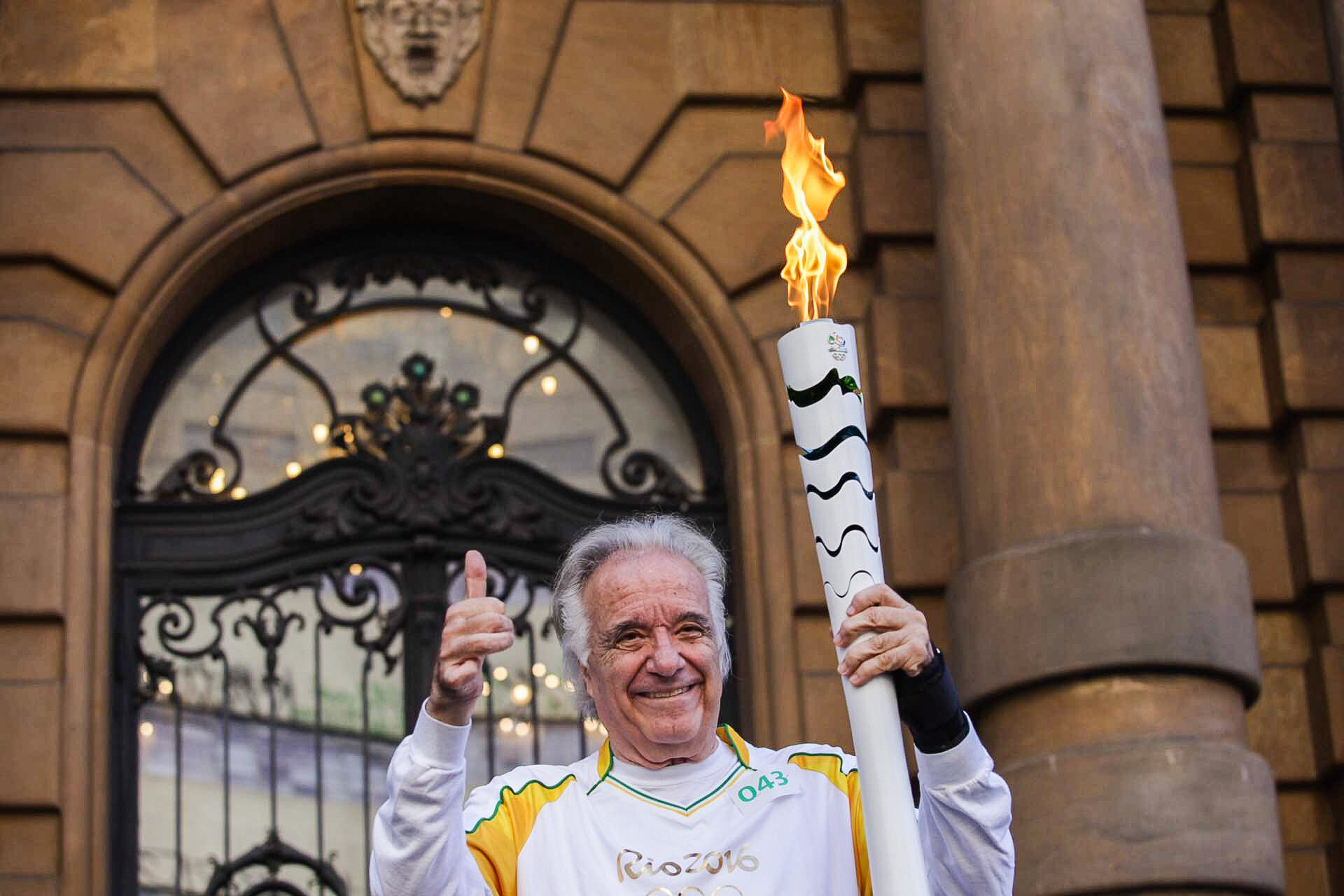 A cidade de São Paulo recebeu neste domingo (24) o revezamento da tocha olímpica. O percurso começou pouco antes das 8h, em frente ao Museu do Ipiranga, e percorreu pontos importantes da capital, como o Obelisco do Ibirapuera (Mausoléu ao Soldado Constitucionalista de 1932), Pinacoteca do Estado, Estação da Luz, Estádio do Pacaembu e o Memorial da América Latina. Foto: Diogo Moreira/ A2IMG